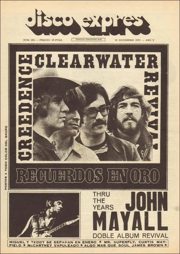 Portada de Disco Exprés, 1972 (Segunda época)